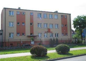 Powiatowy Inspektorat Nadzoru Budowlanego i Zarząd Dróg Krajowych, ul. Krótka 7 w Słubicach